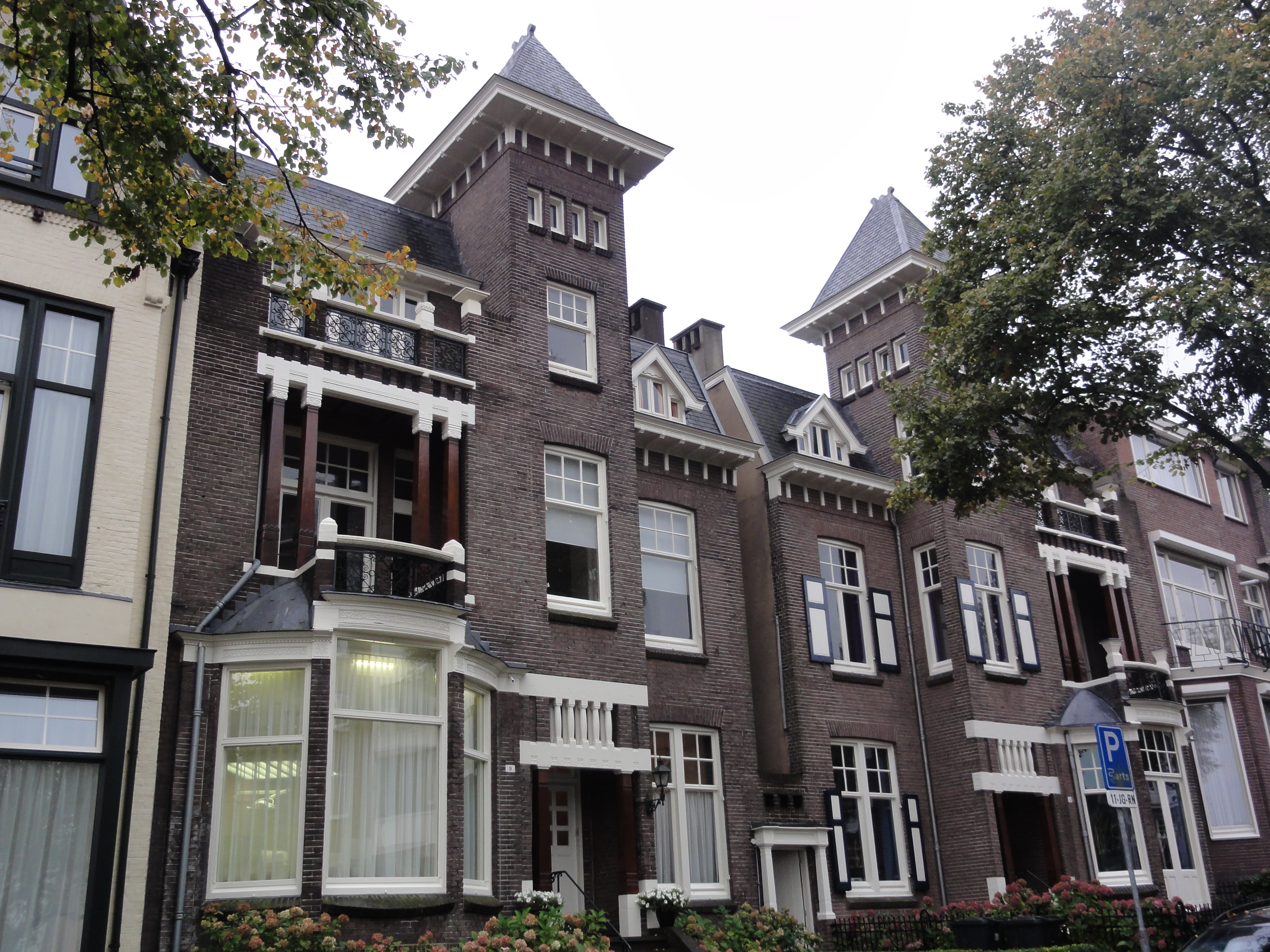 Arnhem Rijksmonument 516859 Bouriciusstraat 9,11. Art Nouveau bouwstijl.